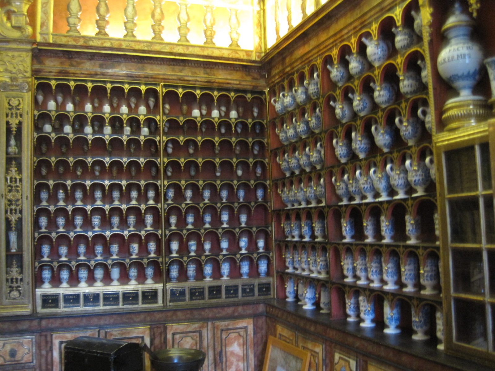 Apothicairerie de Besançon